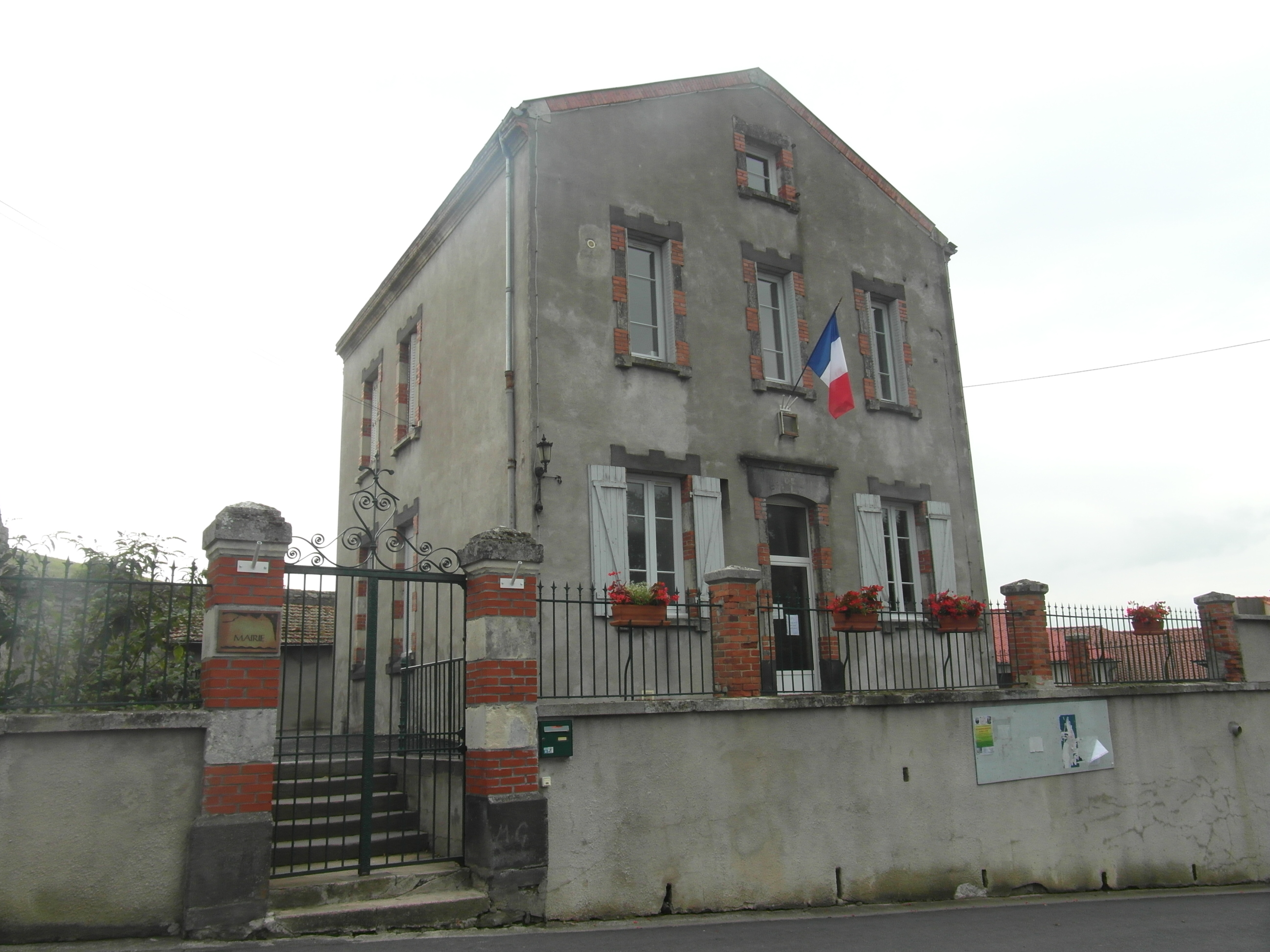 Mairie de Saint-Yvoine (63)